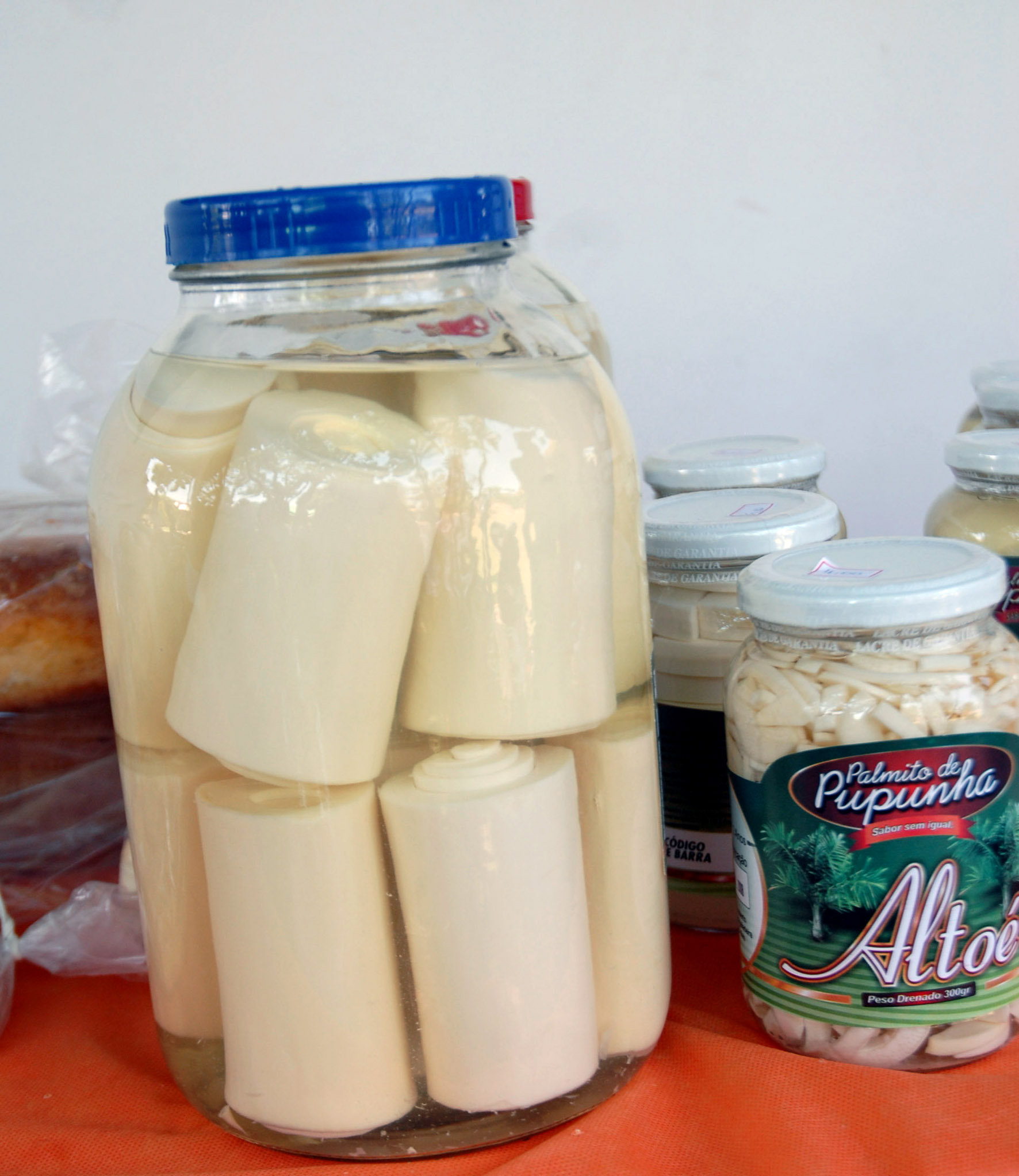 Produtores do Núcleo Rural de Tabatinga, em Planaltina, no Distrito Federal, mostram seus produtos no Dia de Campo de Pupunha, promovido pela Emater